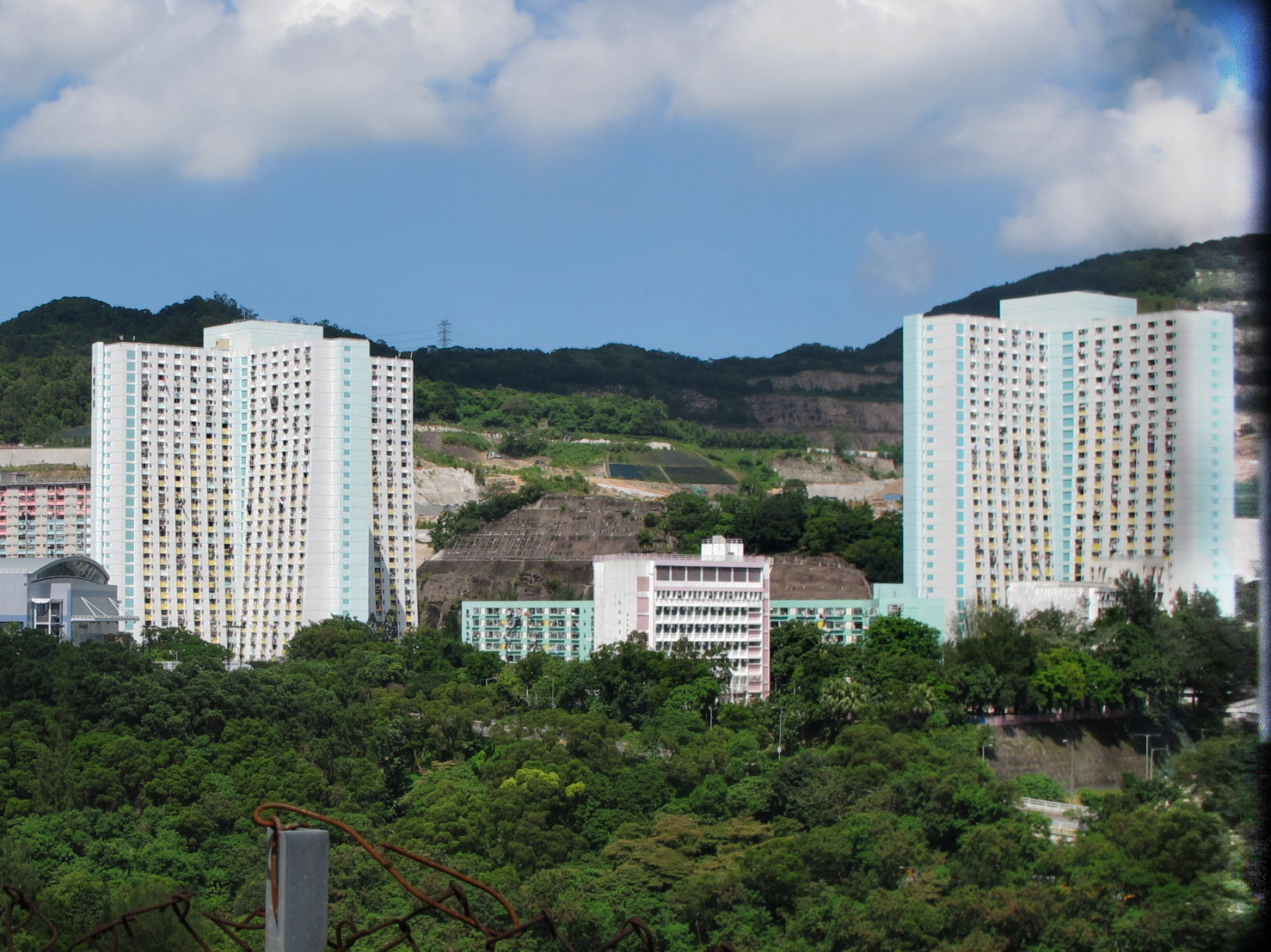 Shun On Estate 順安邨